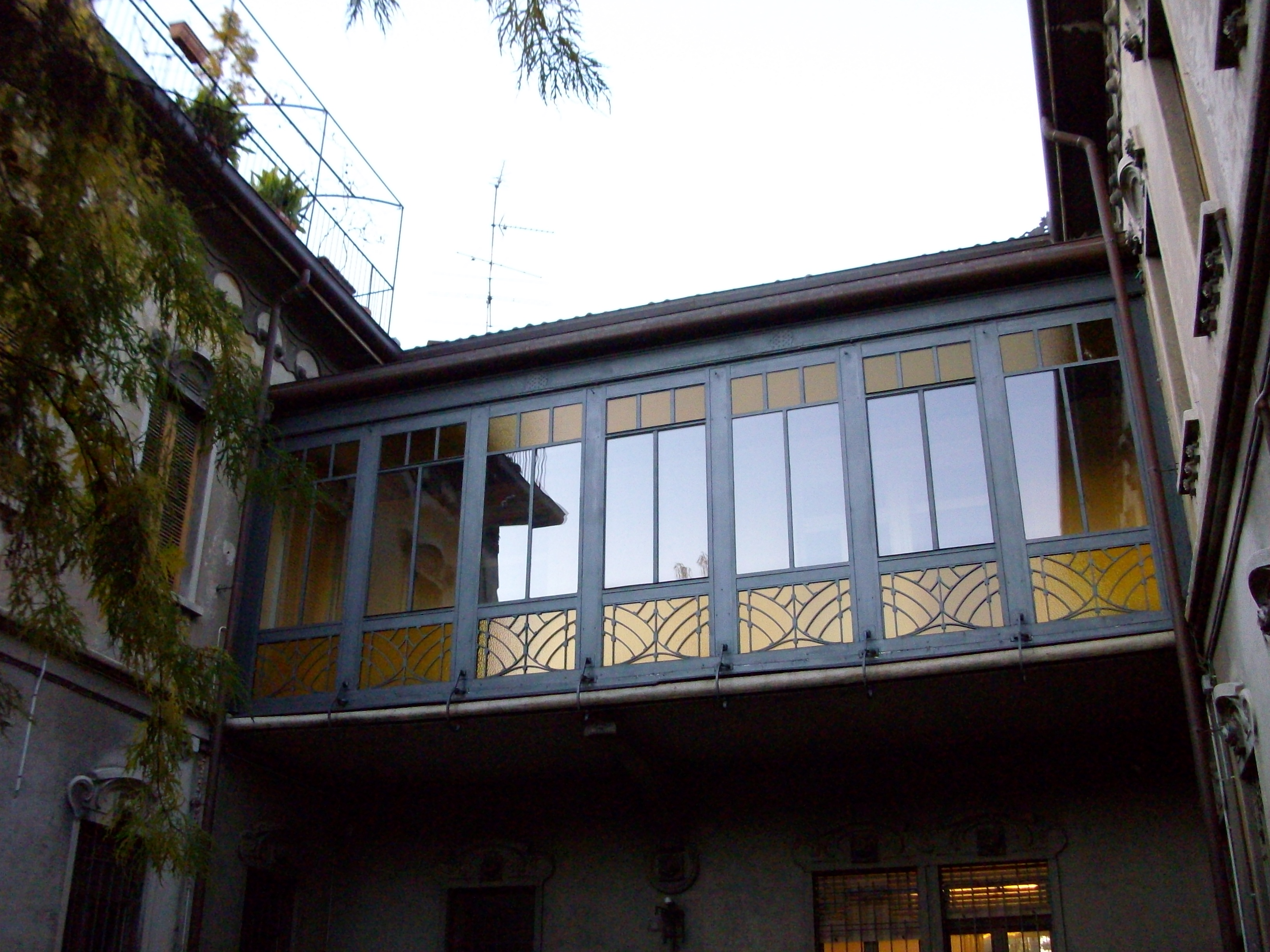 Veranda cortile interno